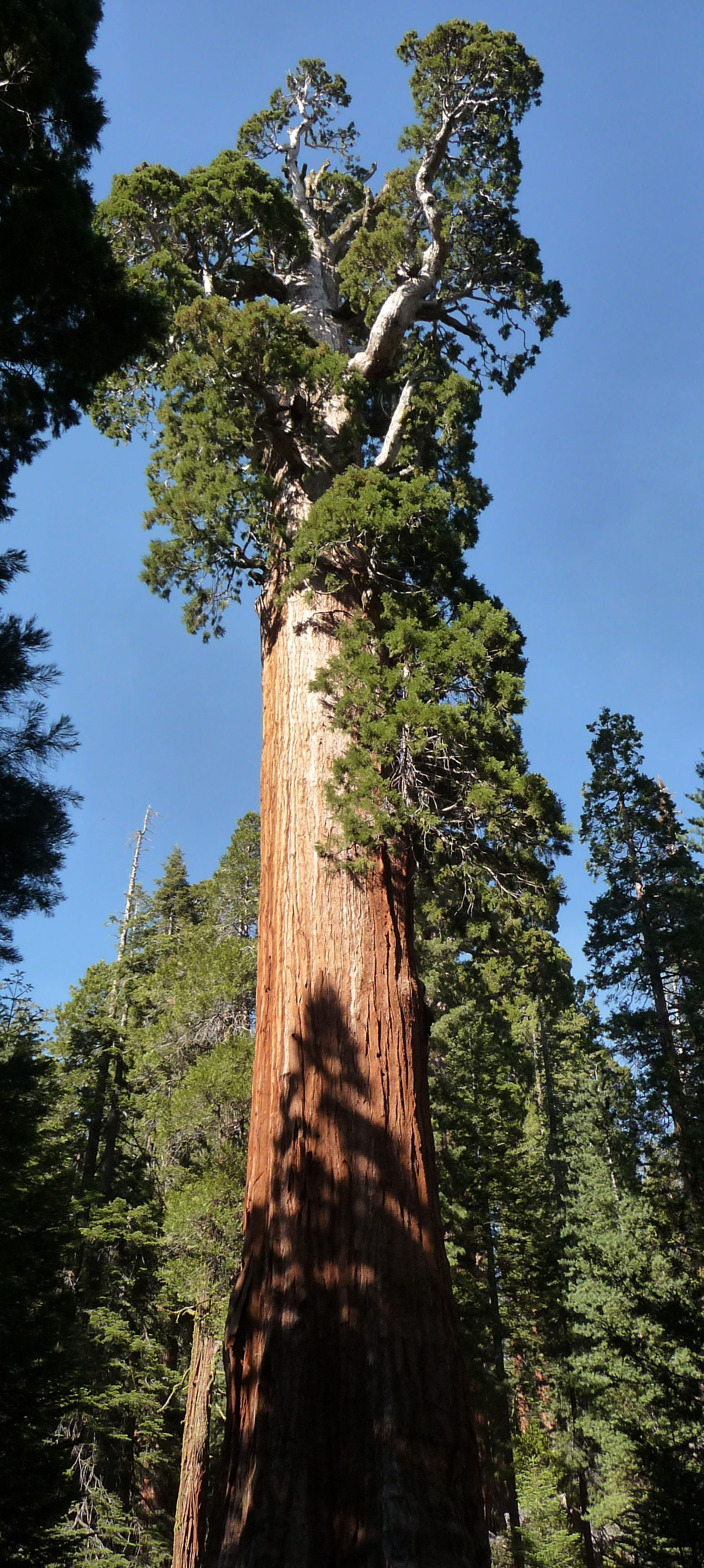 Giant Sequoia Sequoiadendron giganteum, General Grant Tree